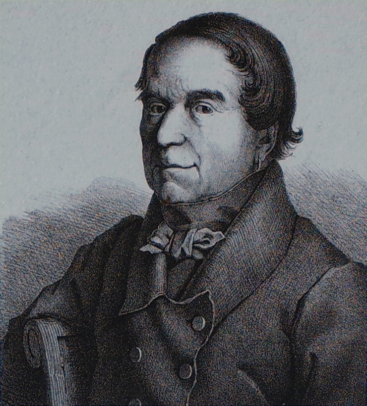 Carlo Ignazio Pozzi, Architekt und deutscher Baumeister (1766-1842). Das Bild ist ein Ausschnitt der Informationstafel am Napoleonsturm in Dessau, Ortsteil Mildensee[1]. Diese Tafel ist nach kurzer Zeit Opfer von Vandalismus gewordenFile:Dessau-Mildensee,Infotafel Turm der acht Winde,Napoleonsturm(2).jpg.